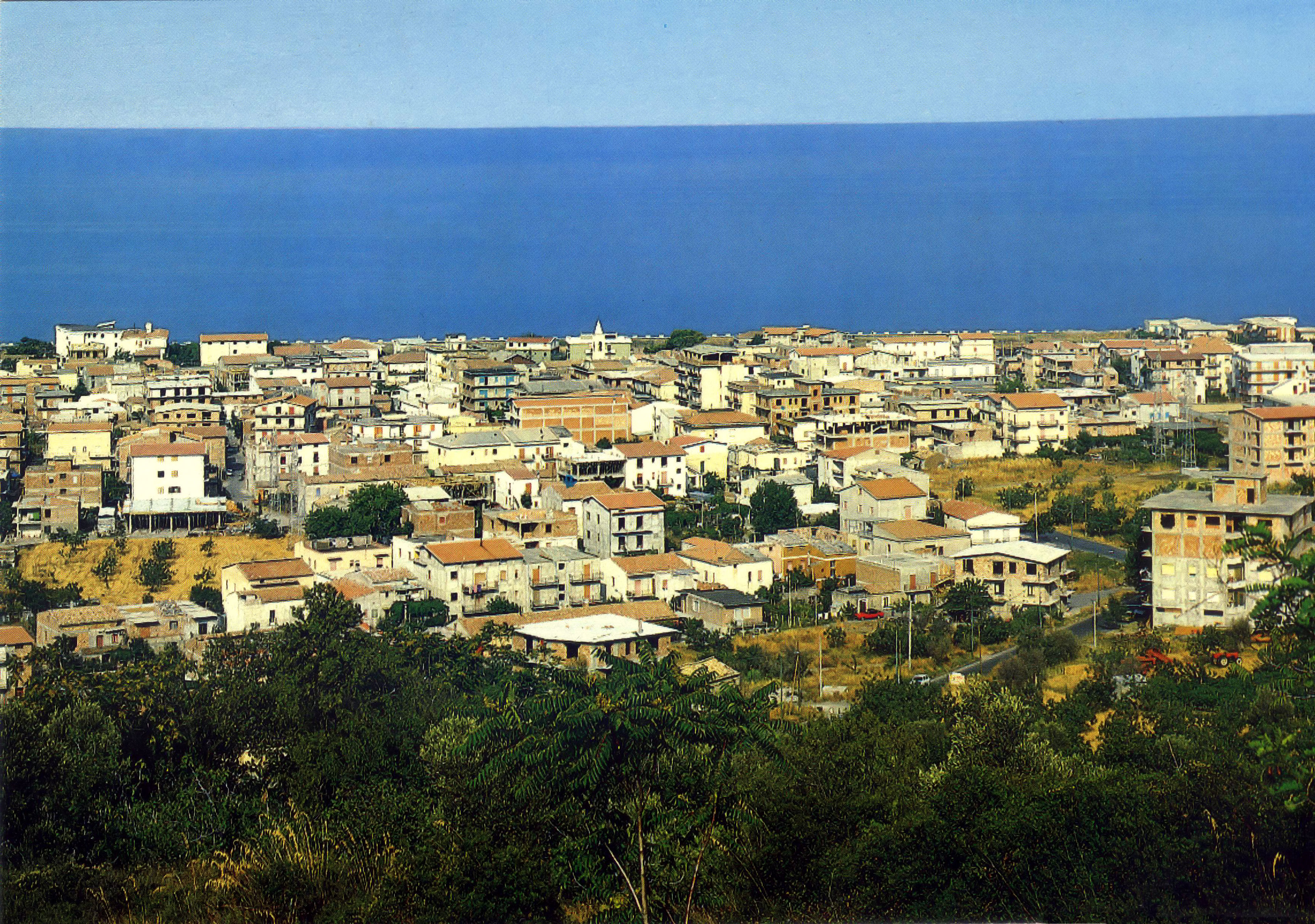 Panorama di Campora San Giovanni negli anni 70